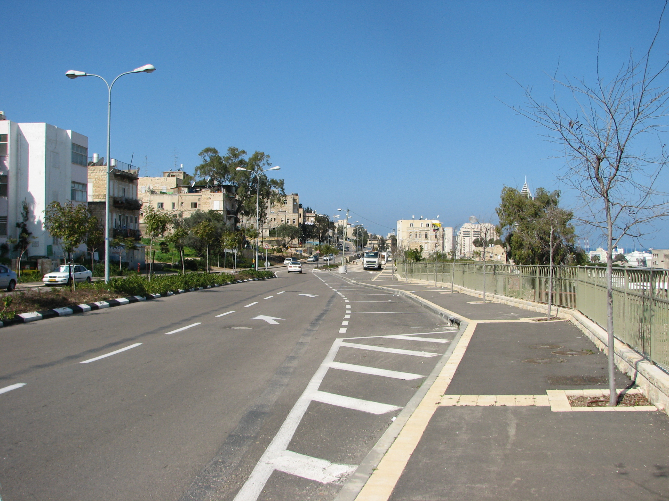 Ard el-Yahud, Haifa, Israel Was the first Jewish Neighbourhood out of the walls of Haifa. established on 1891 ארד אל-יהוד הייתה השכונה היהודית הראשונה שבנו יהודי חיפה מחוץ לחומות העיר שבנה דאהר אל-עומר השכונה נבנתה בשנת 1891 ליד ואדי רושמיה רחוב אבן גבירול, חלק משכונת ארד אל יהוד, . הרחוב הפך להיות חלק מציר תחבורה ראשי של חיפה ממזרח לעיר להדר הכרמל מבט לכוון צפון מערב